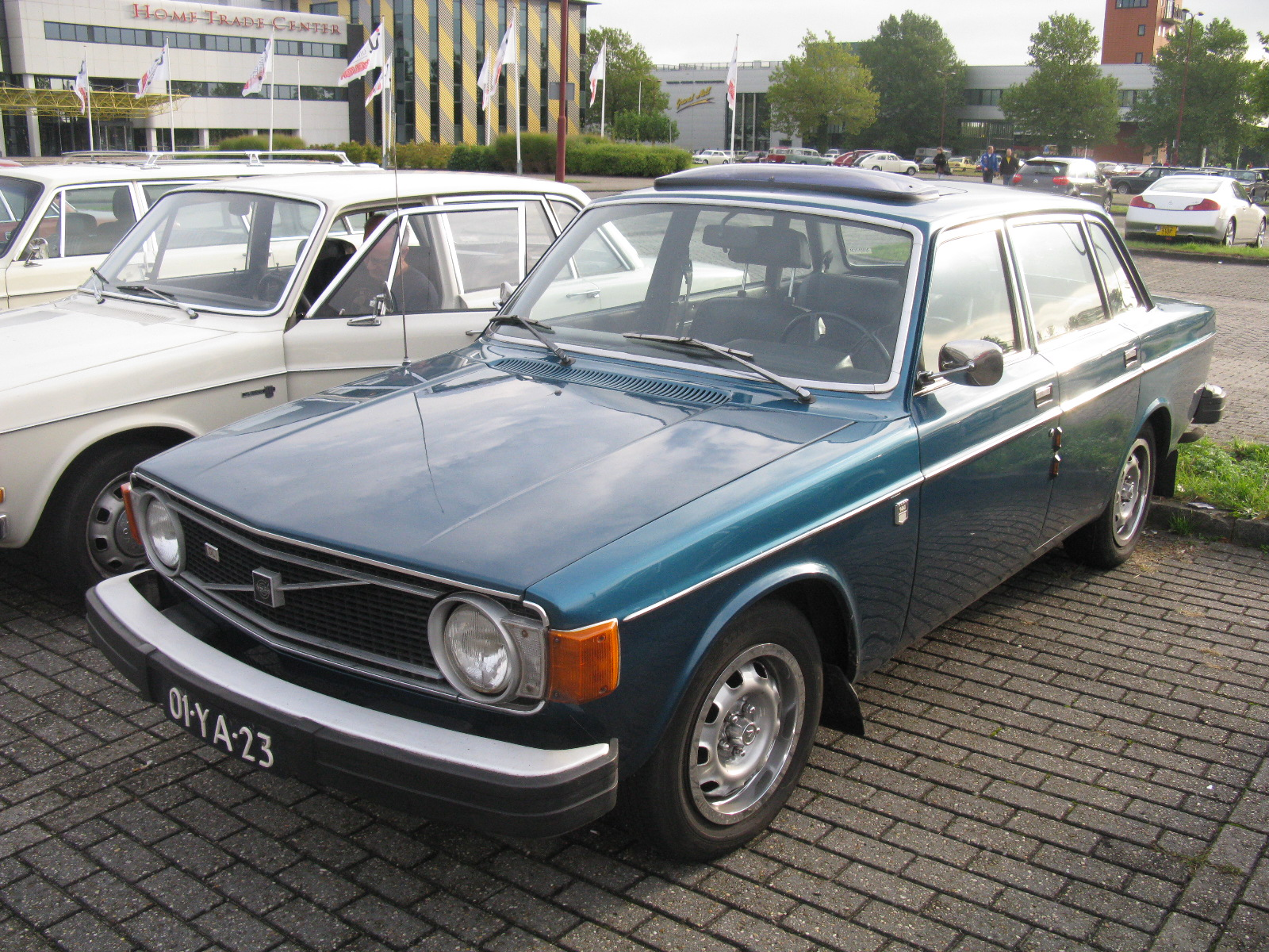 Volvo Klassiekers Beurs, Utrecht